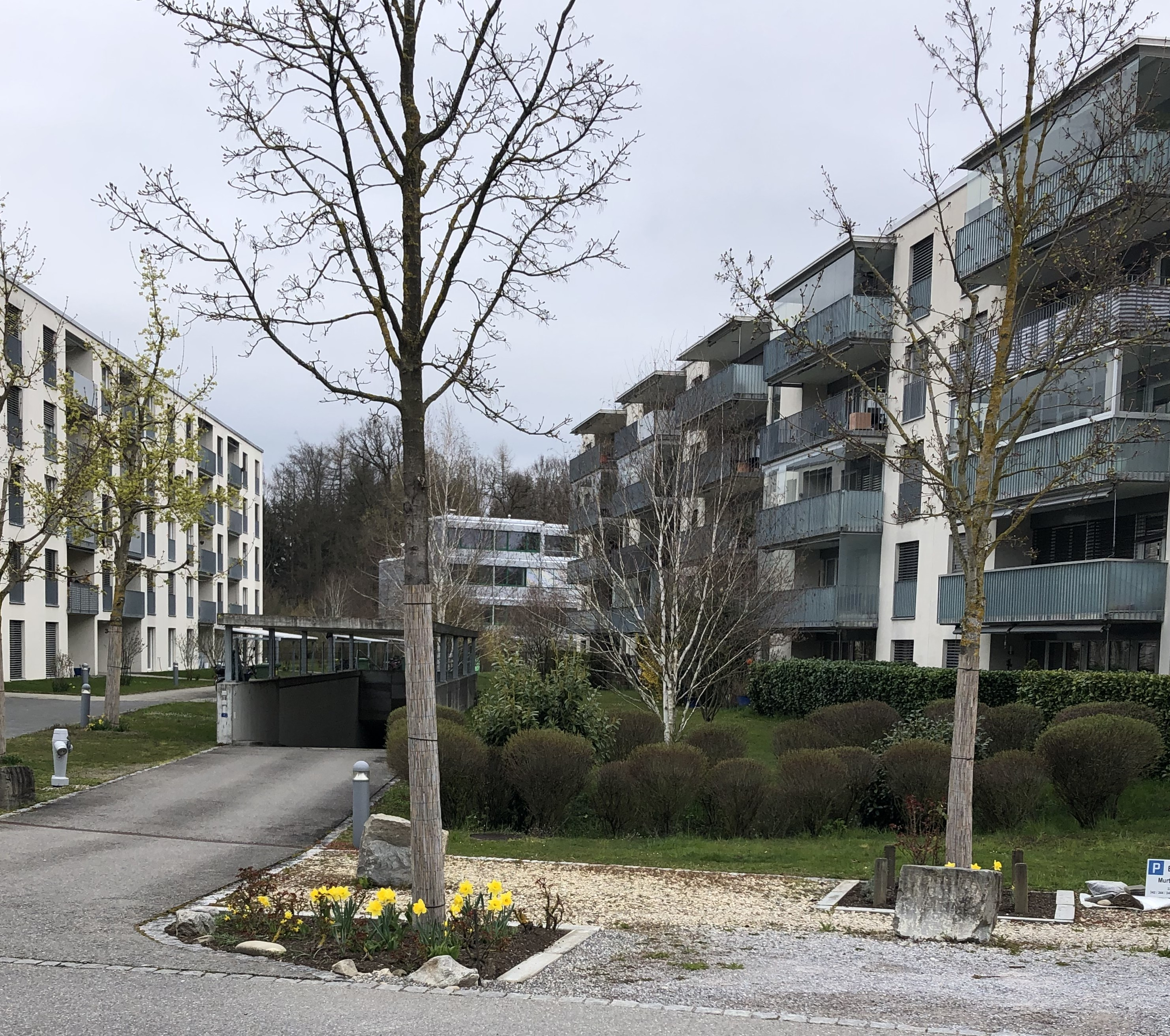 Ackerli Wohnbebauung